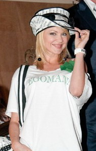 Певица Ирина Ортман